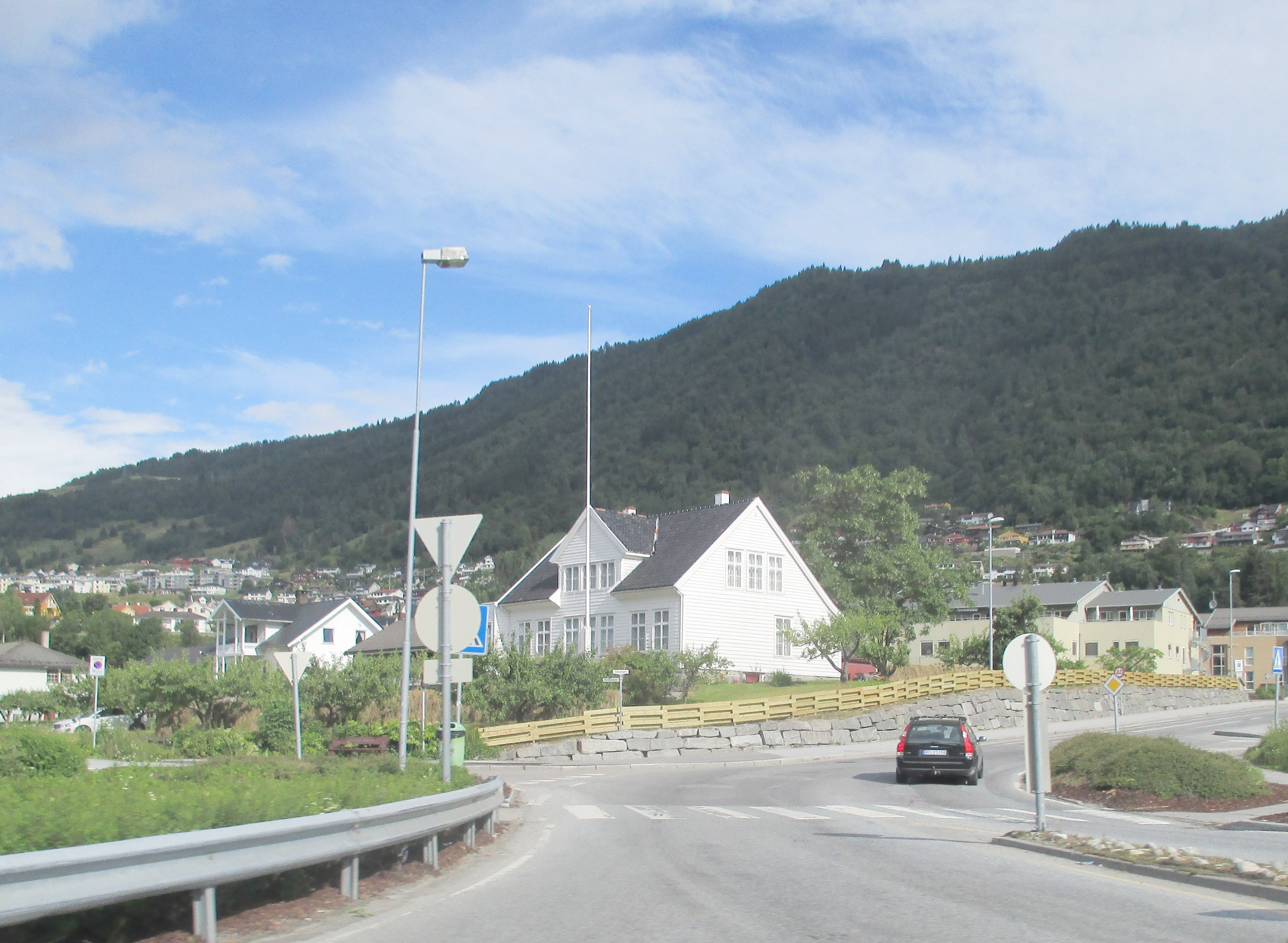 Dalavegen (fylkesvei 211) sett fra riksvei 5 i Sogndal sentrum